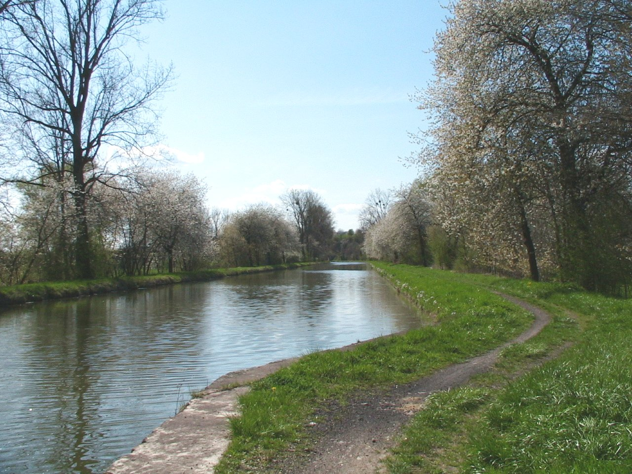 Canal du Rhone au Rhin près d'Allenjoie (25) Photo prise fin avril 2006 par F5ZV